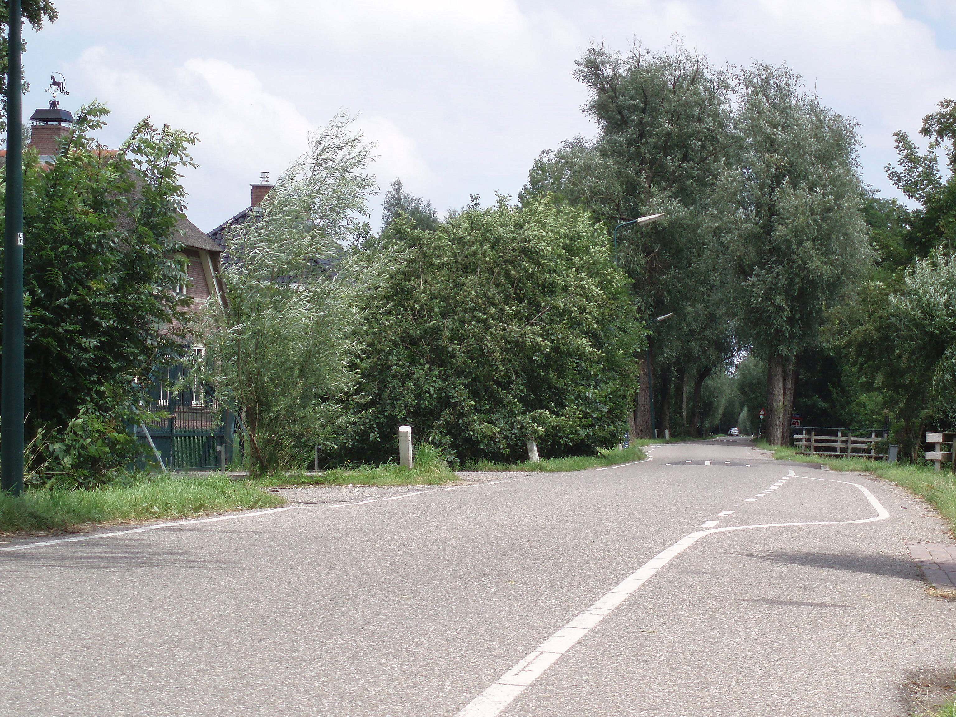 's-Gravensloot in de gemeente Woerden.